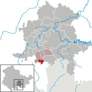 Piesau in Thuringia - District Saalfeld-Rudolstadt